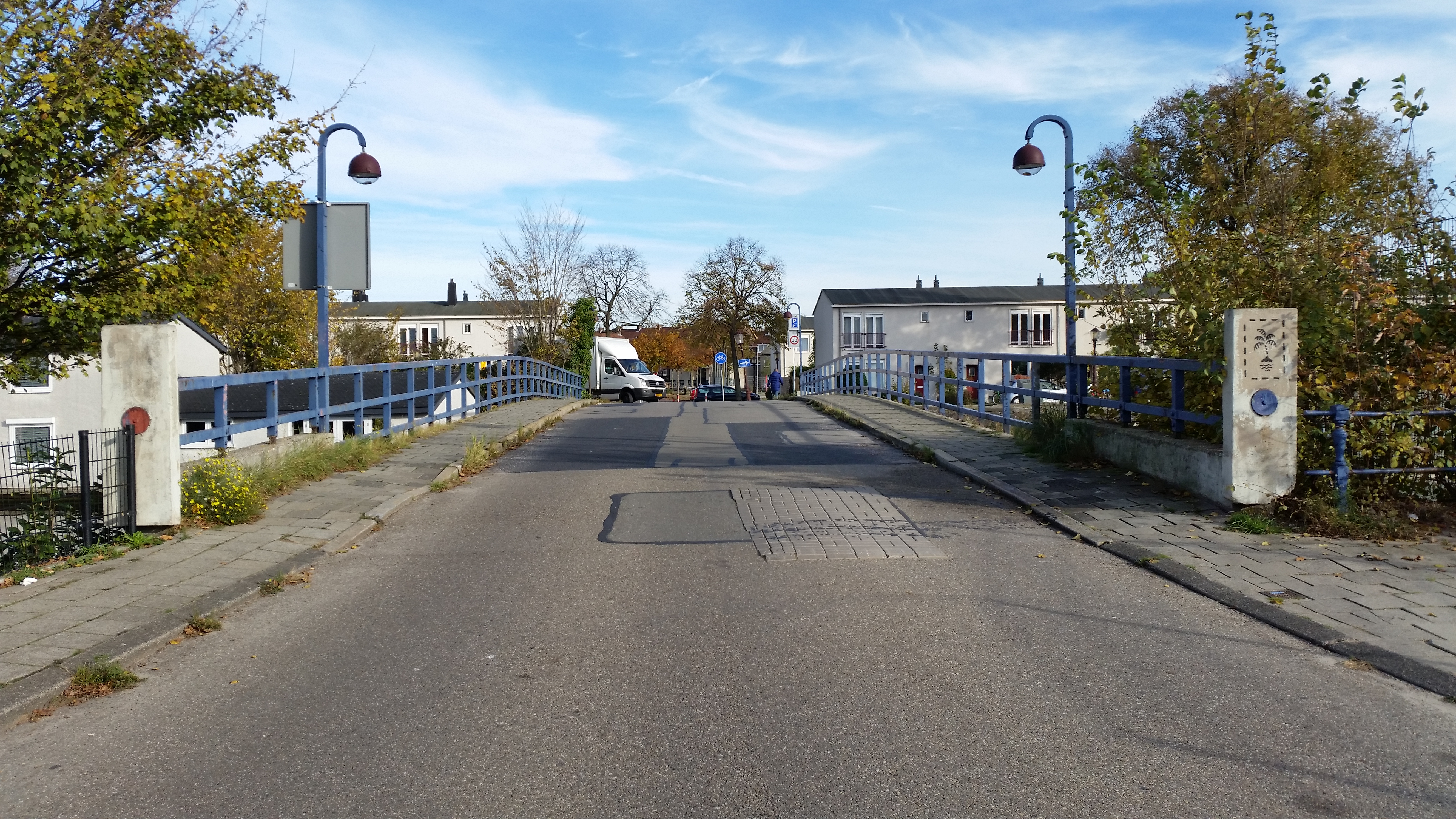 Overzicht van Brug 371, Leeuwenputbrug naar de Ranonkelkade